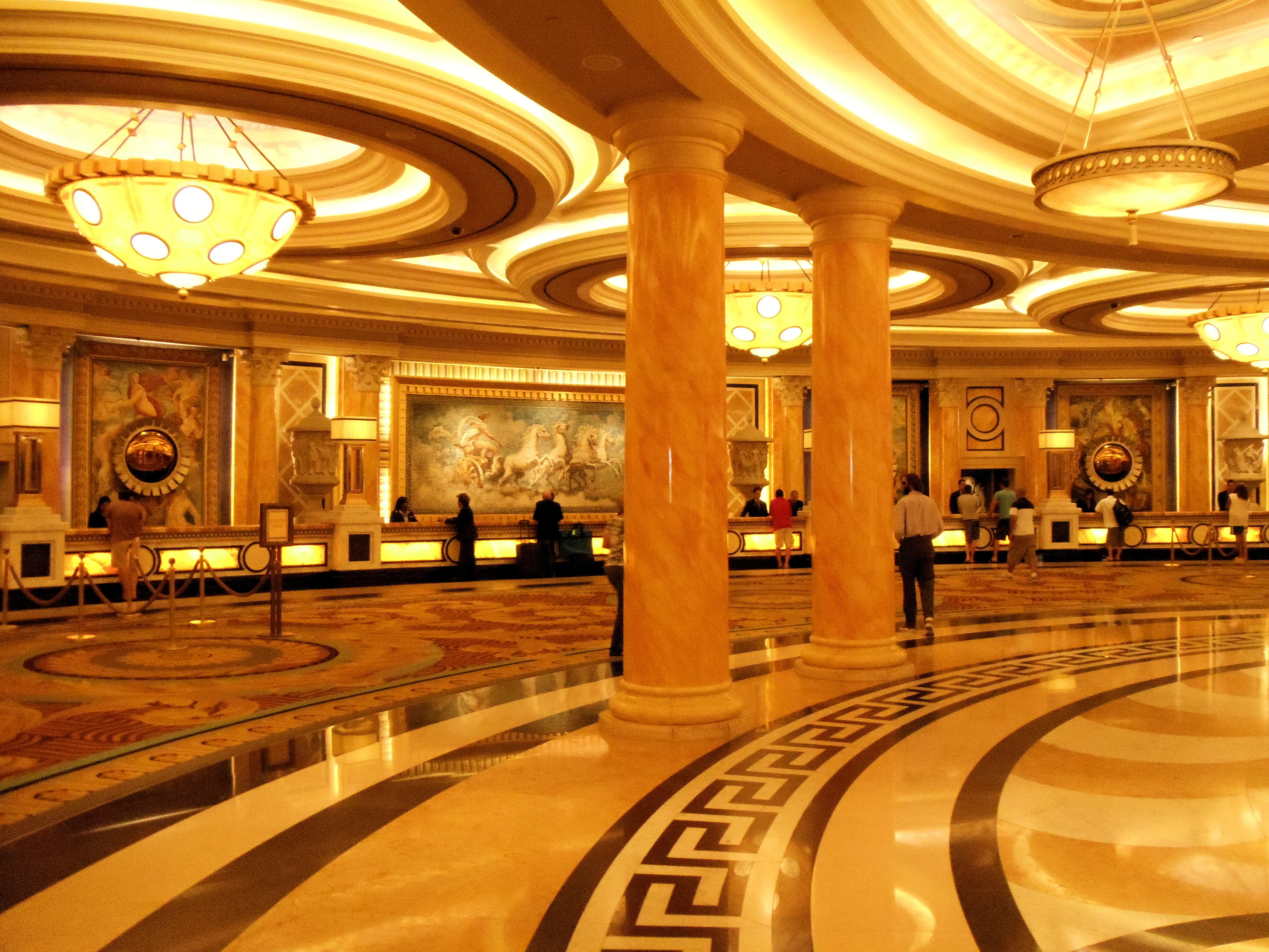 Caesar’s Palace Hotel and Casino, Las Vegas, Nevada